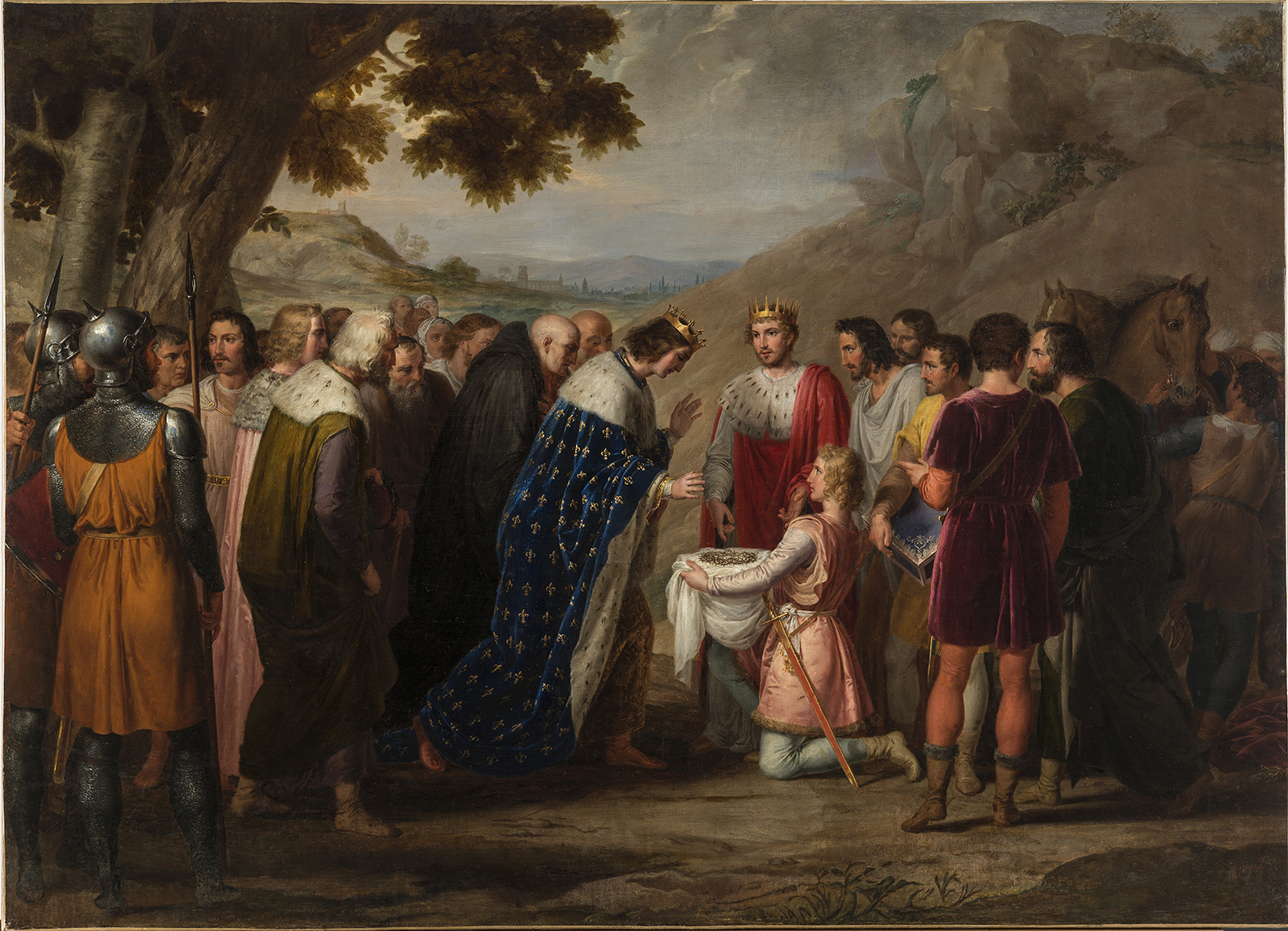 Saint-Louis recevant la sainte couronne de Baudouin II Provenance : peint pour l'infant Don Sébastien-Gabriel de Bourbon-Bragance (1811-1875) : offert par celui-ci à sa belle-sœur, l'infante Louise-Charlotte de Bourbon-Sicile (1804-1844); resté après sa mort à son époux l'infant François de Paule Antoine de Bourbon (1794-1865) ; Vente à Paris, 21-22 janvier 1926.